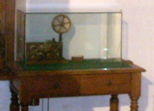 Mire zur Orientierung astronomischer Transit-Instrumente